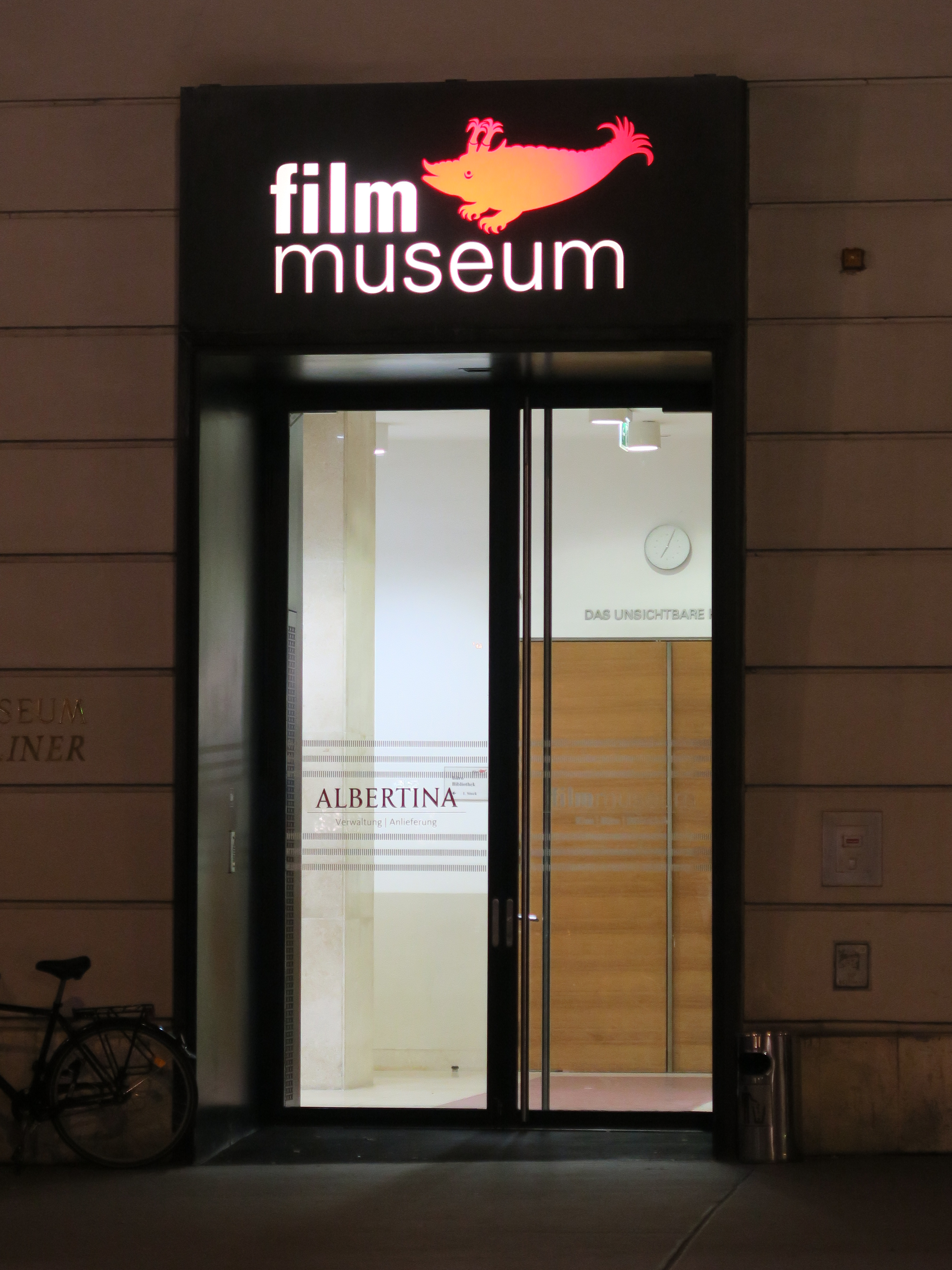 Eingangspforte des Museums mit Phantasiewesen Zyphius als Wappentier